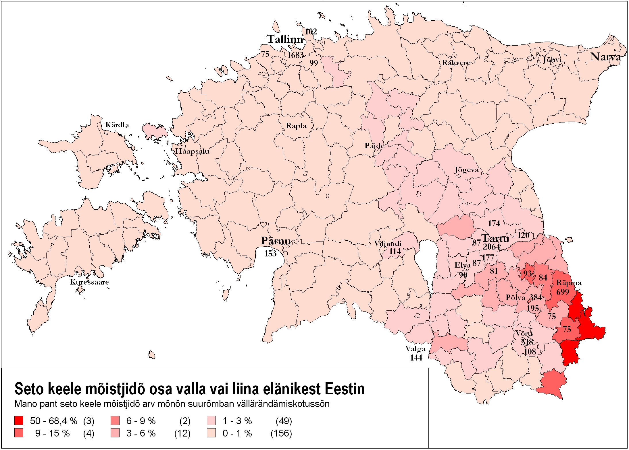 Võro: Seto keele mõistjidõ protsent Eesti umavalitsuisin ja arv suurõmbin elopaigon 2011. aastaga rahvalugõmisõ perrä.